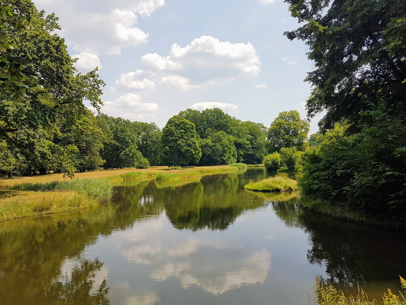 Wasserlandschaft innerhalb des Landschaftsgartens (2017)